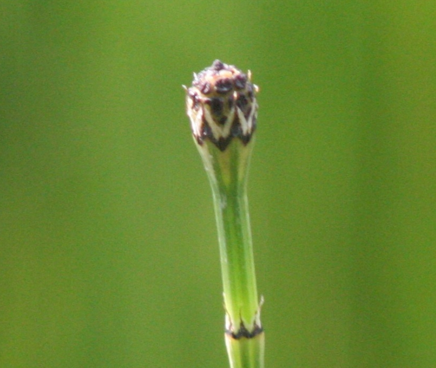 Equisetum_variegatum (Equseto variegato) Località : Giardino Botanico Alpino "Giangio Lorenzoni", Pian Cansiglio, Tambre d'Alpago (BL), 1000 m s.l.m.